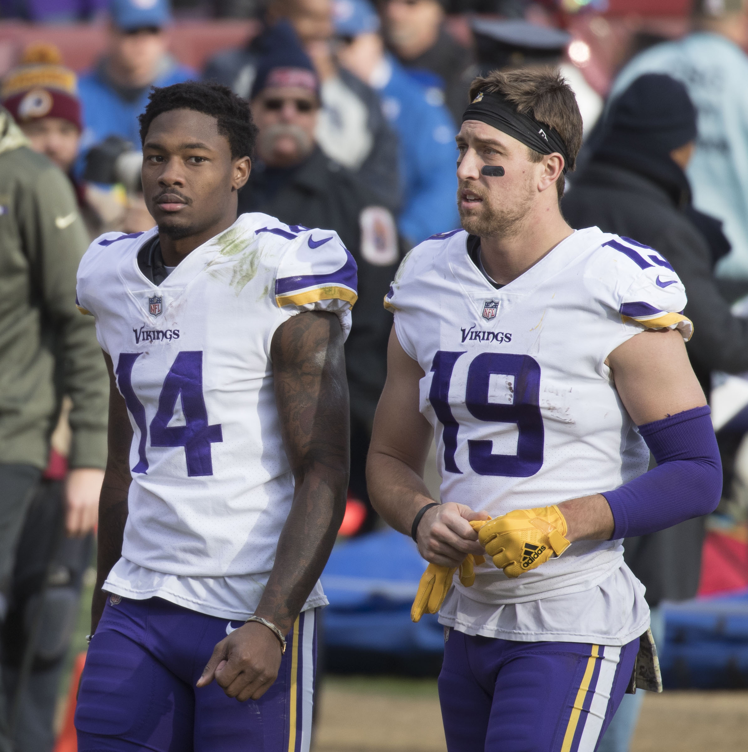 Vikings at Redskins 11/12/17